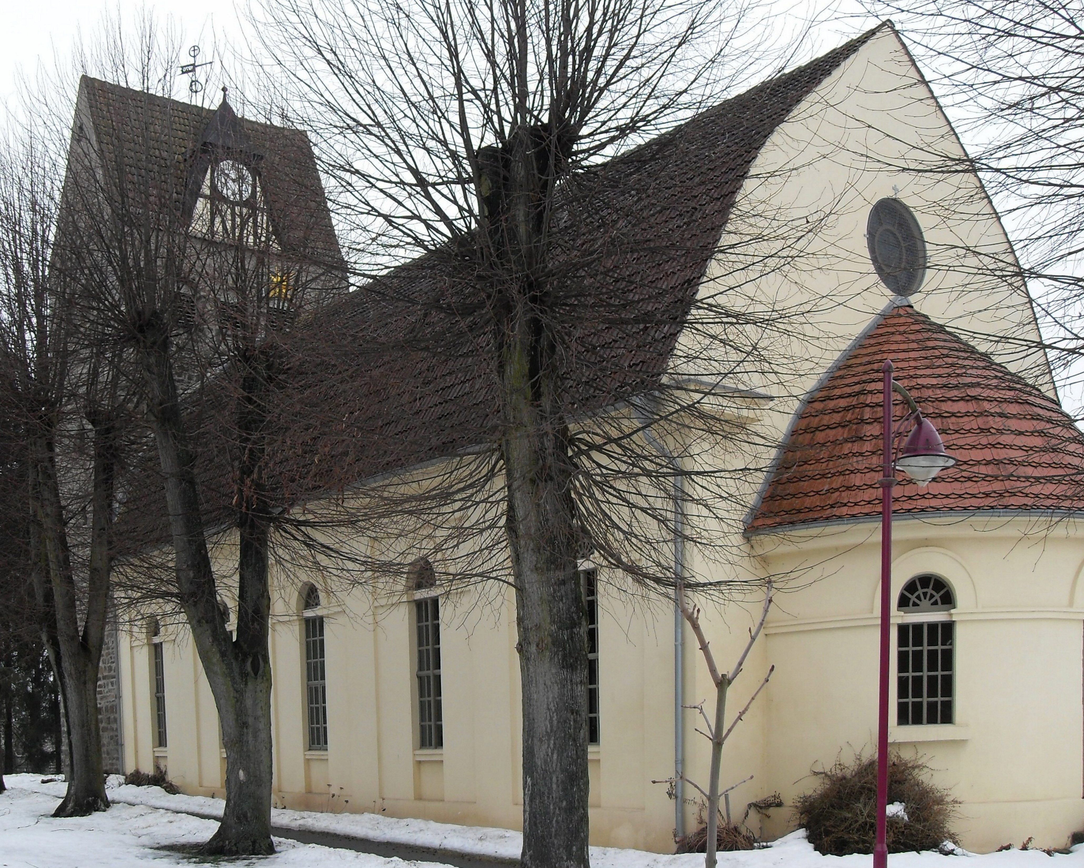 Kirche St. Mauritius in Bornstedt, Gemeinde Hohe Börde, Landkreis Börde, Deutschland